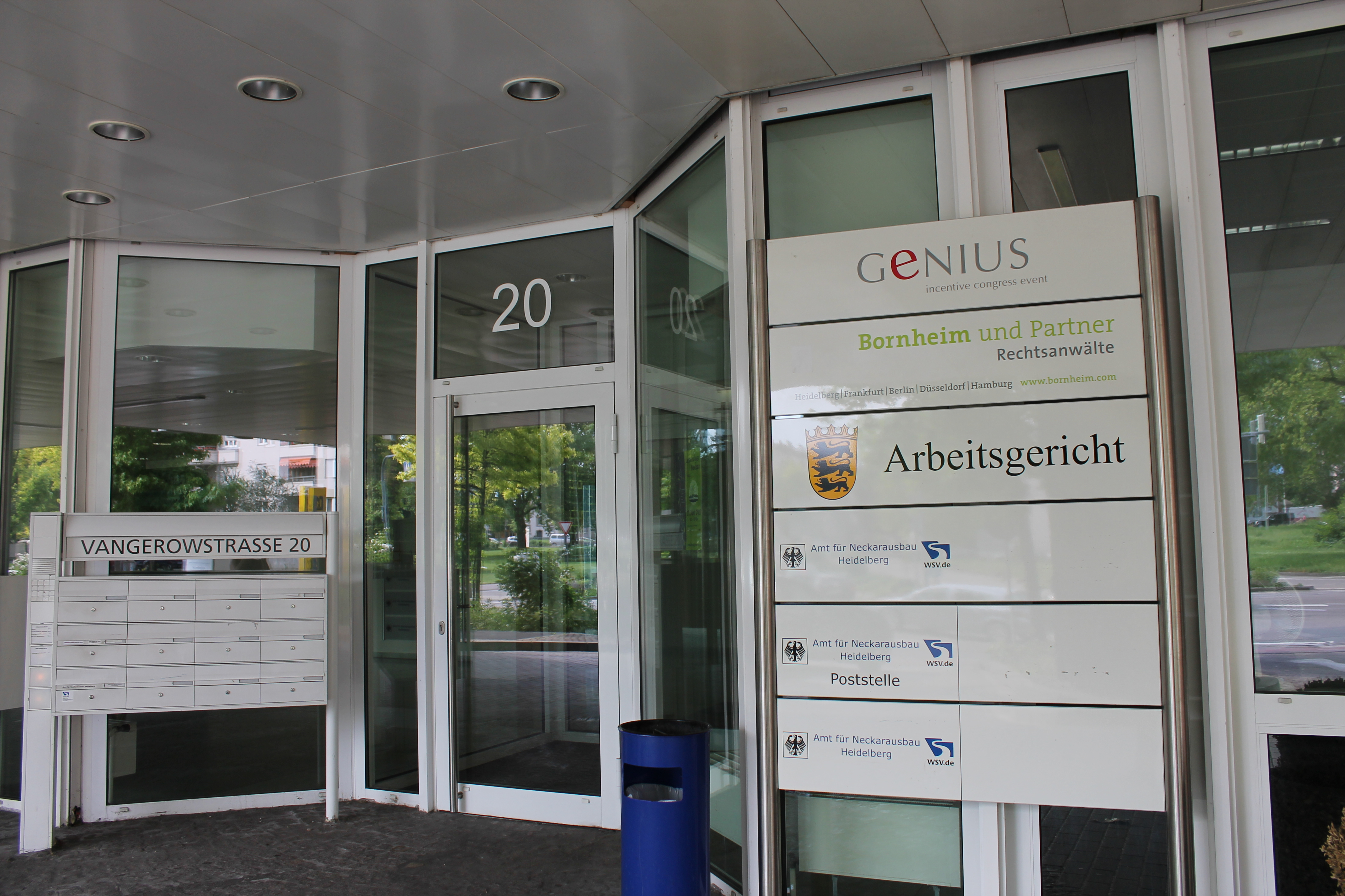 Eingang zum Amt für Neckarausbau in der Vangerowstr. 20 Heidelberg